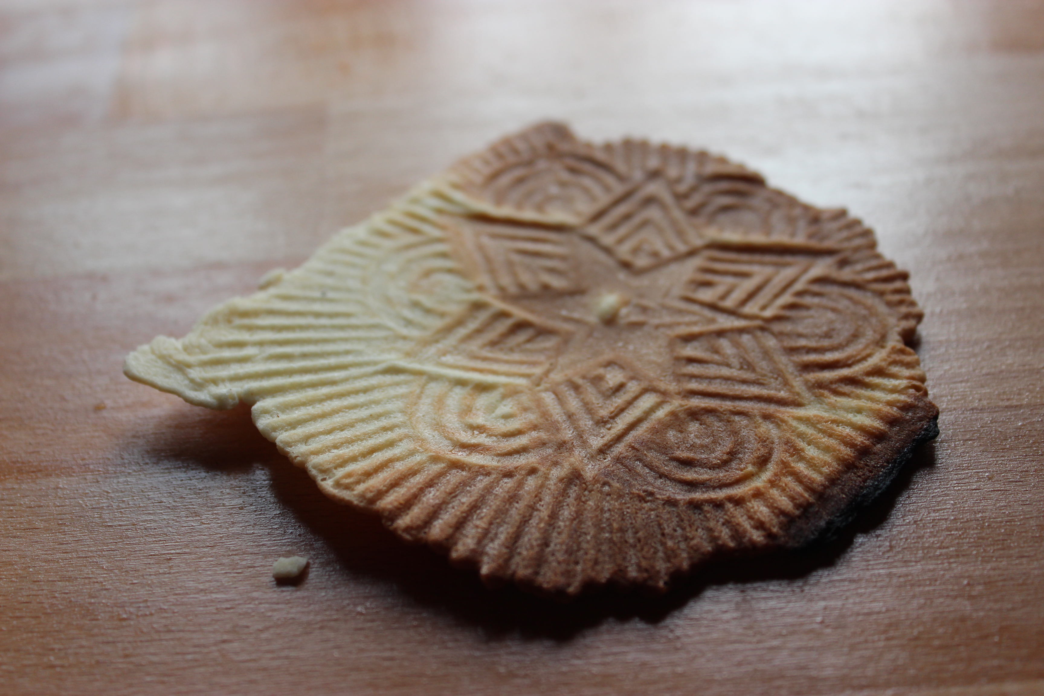 Cène, pâtisserie moulée (type gaufre) du pays de Saint-Léonard-de-Noblat